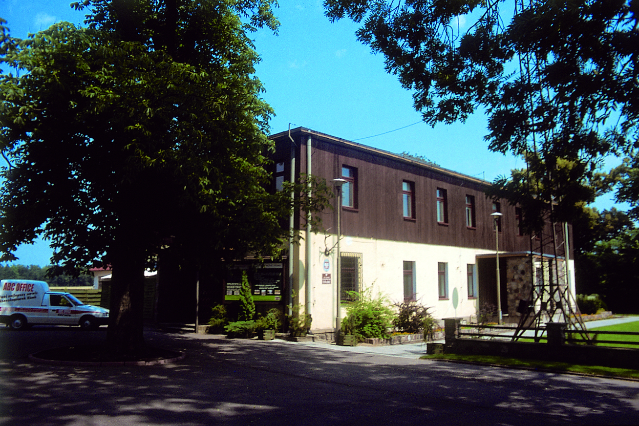 Gołąbki, siedziba nadleśnictwa